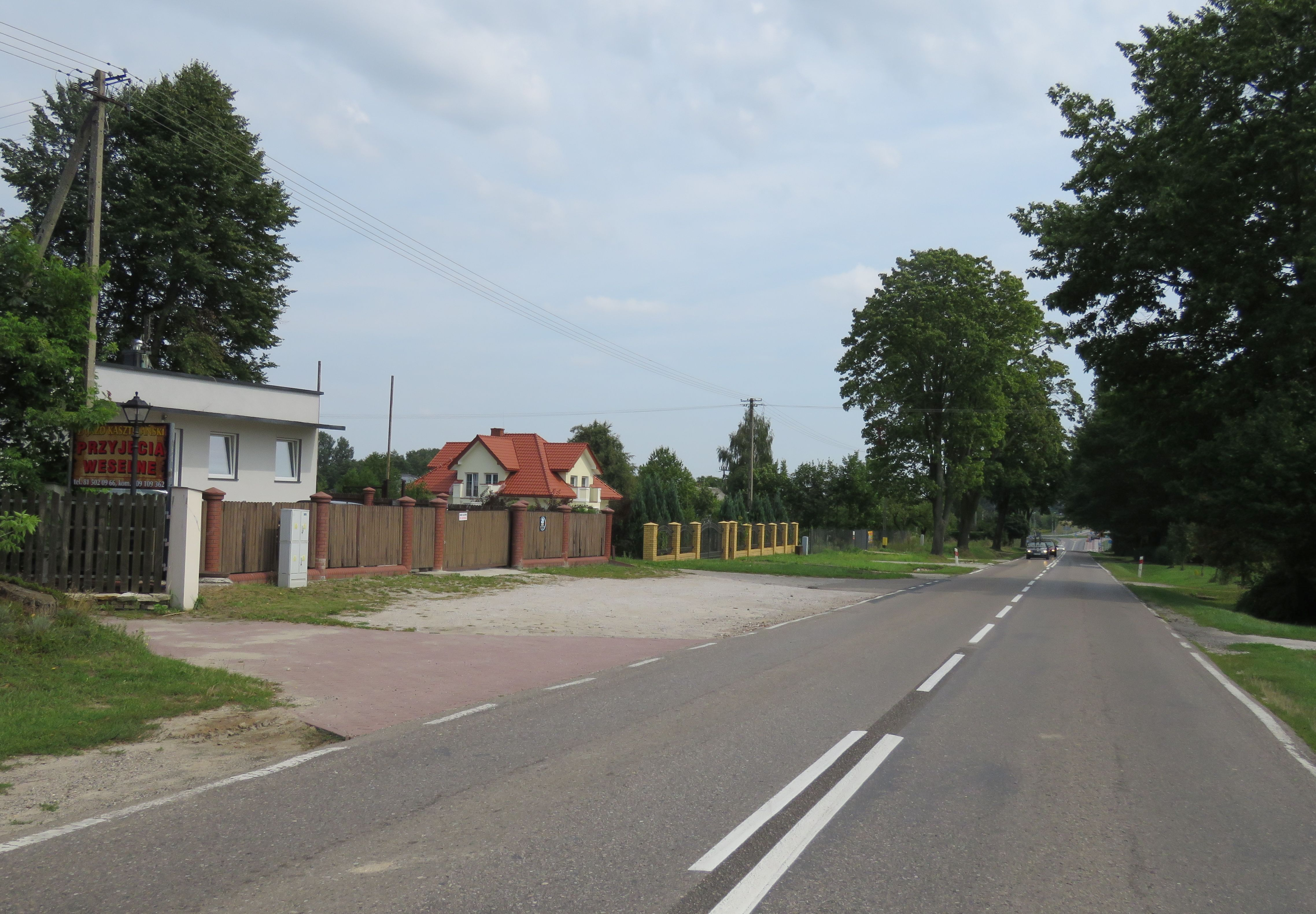 PŁOUSZOWICE - KOLONIA